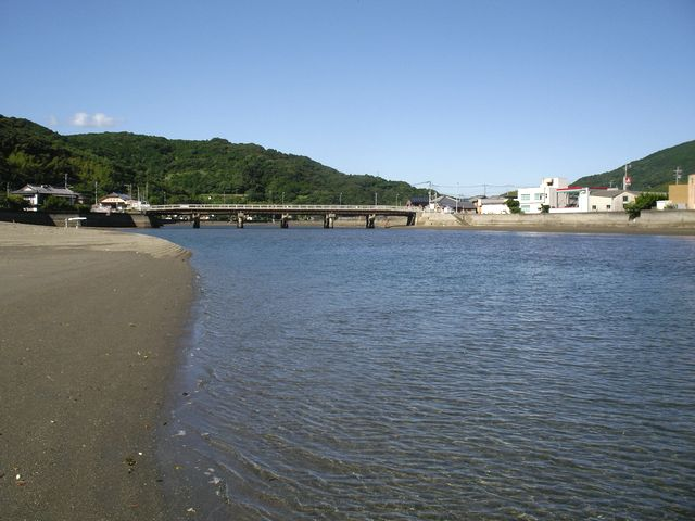 雪浦川の河口と、河口に架かる下釜橋（国道202号）。長崎県西海市雪浦